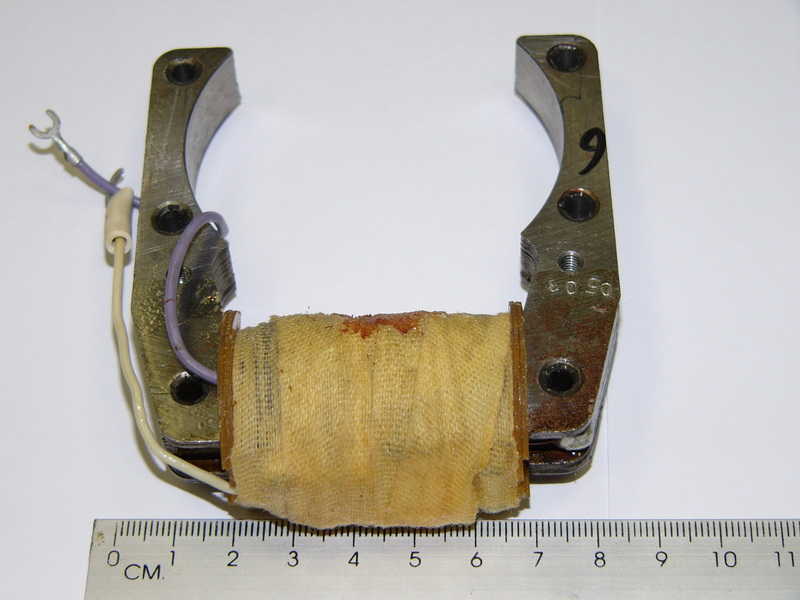 Магнето Д8, применяемое на двигателях Д6, Д8.